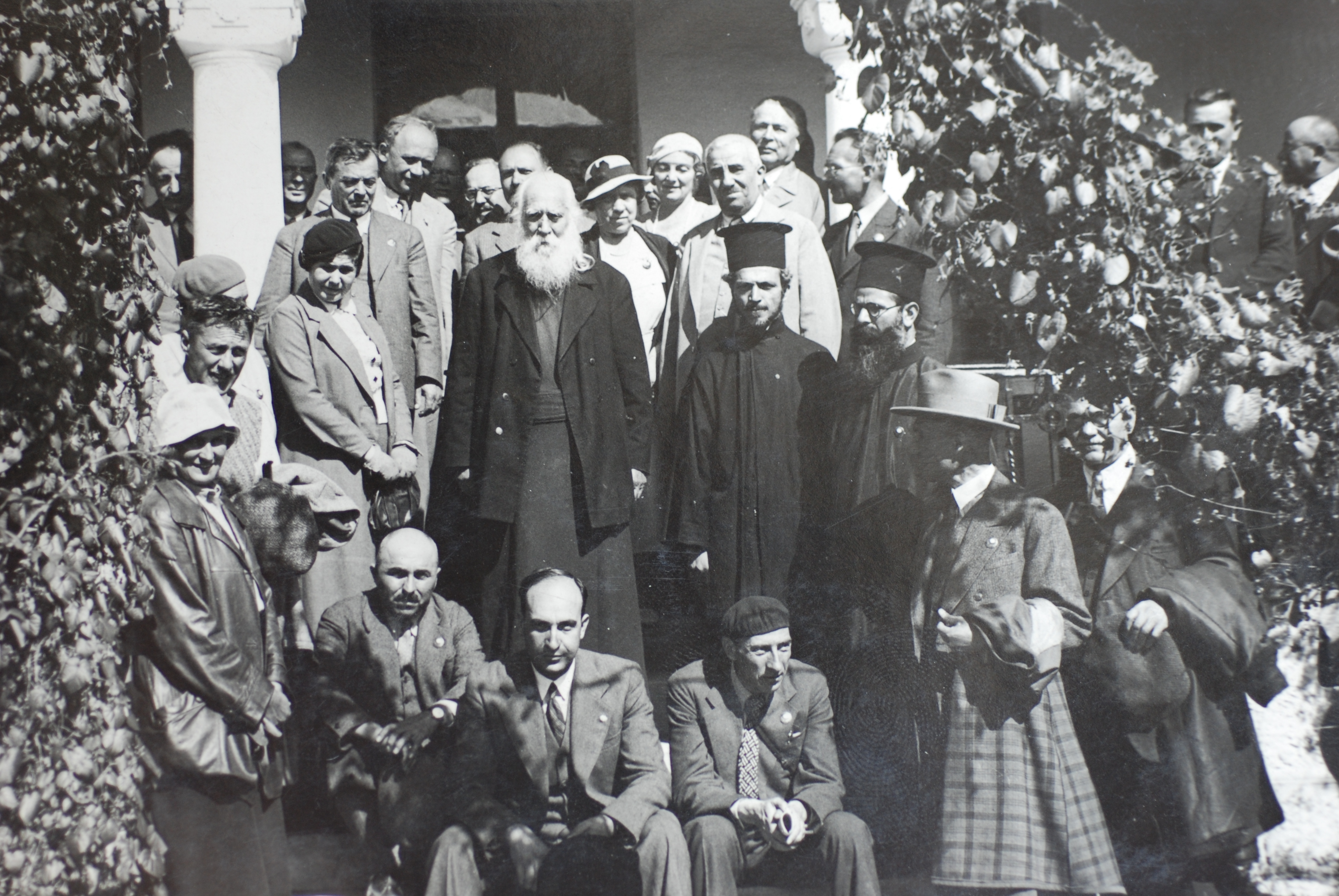 Варненско-преславският митрополит Симеон заедно с участници в IV международен конгрес по византийски изследвания, проведен в София от 9 до 15 септември 1934 г. Преслав, ок. 20 септември 1934 г.